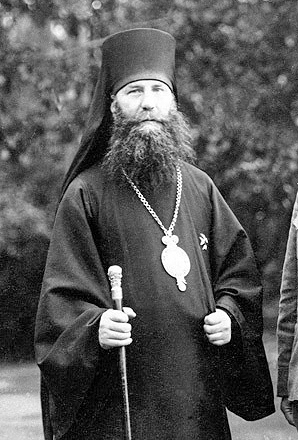 епископ Пантелеимон (Рожновский) в 1916 году